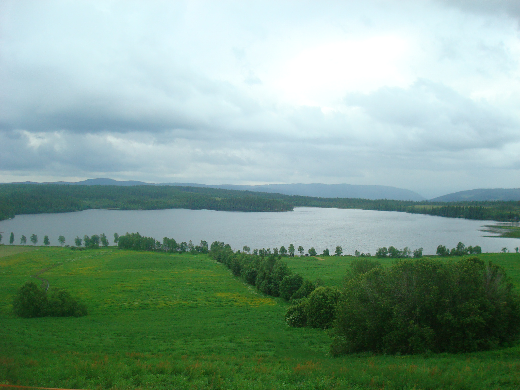 Ullsjøen på Vest-Torpa i Nordre Land kommune.